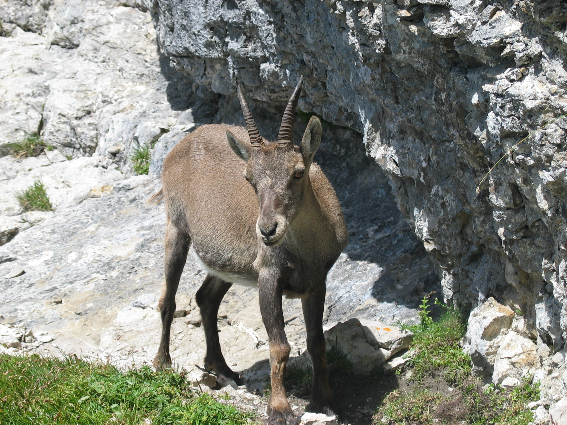 Hembra de íbice en los Alpes franceses Ibex in french Alpes (Near Annecy), Capra Ibex, one female Picture taken in Alpes, France, on 07/28/2005, by User:julio